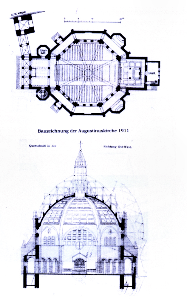 Bauzeichnung St. Augustinus Nordhorn